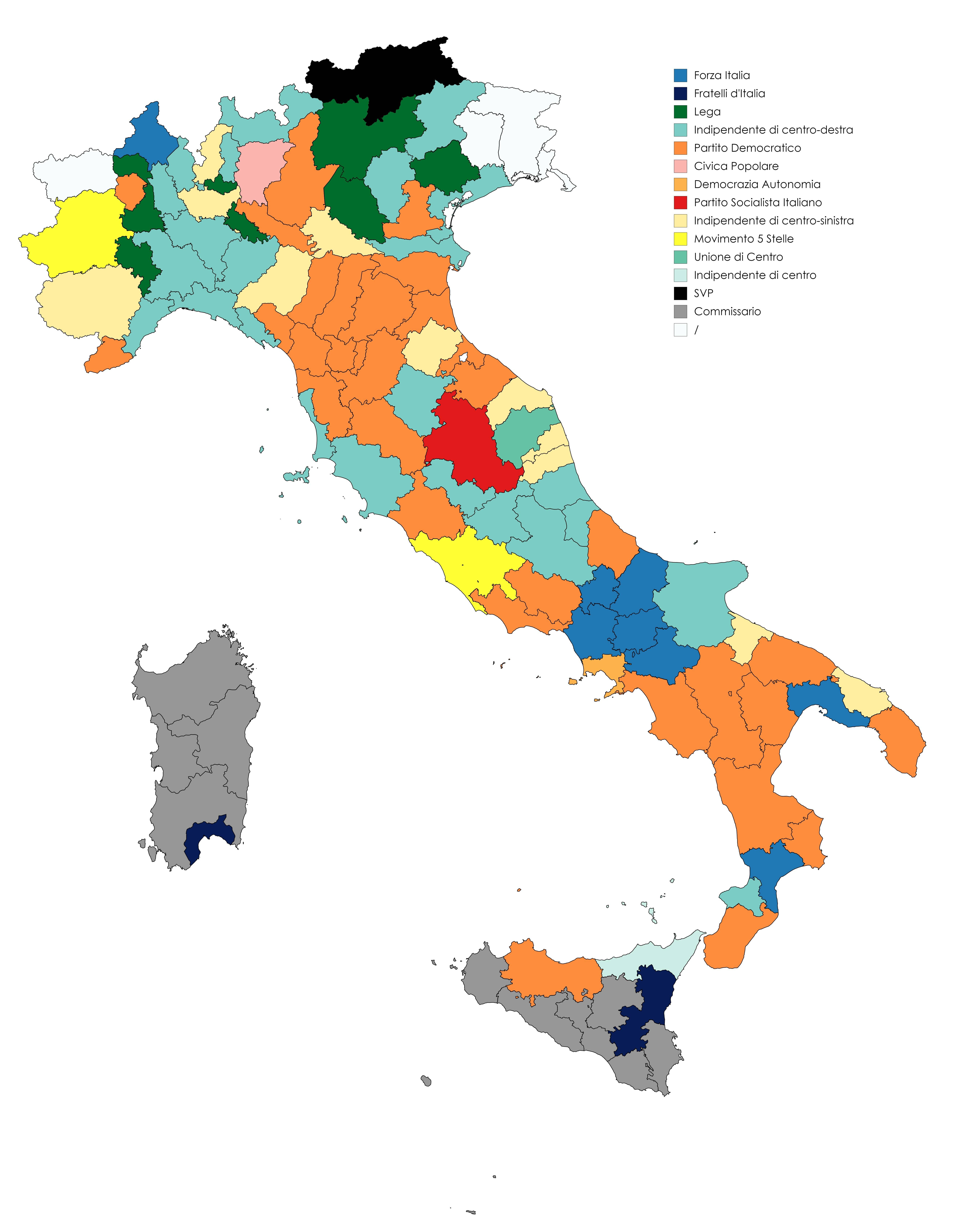 Mappa dei Presidenti delle Province italiane per partito